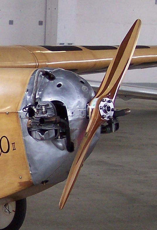 Bristol Cherub II, eigenes Bild